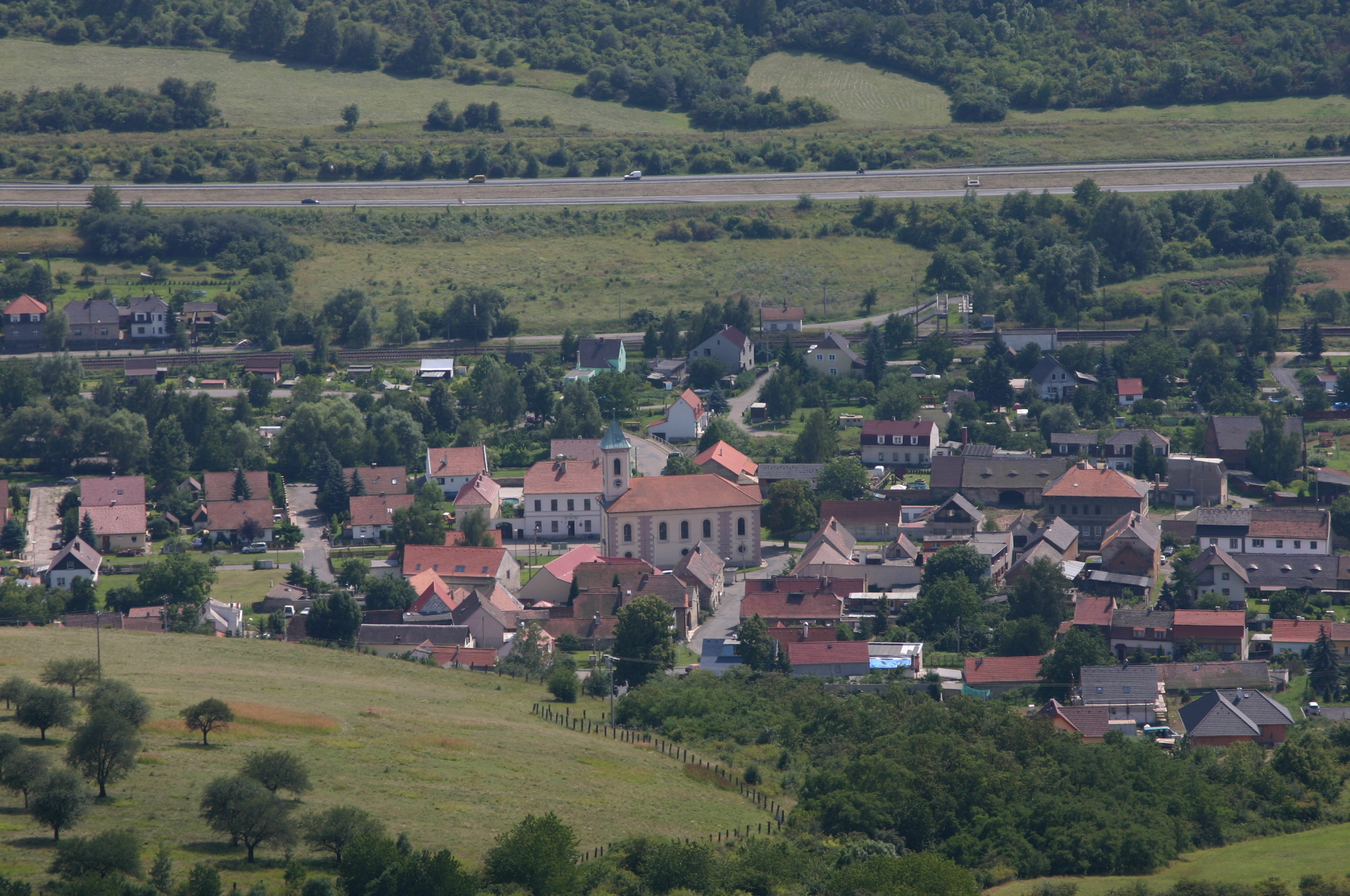 Obec Želenice v okrese Most